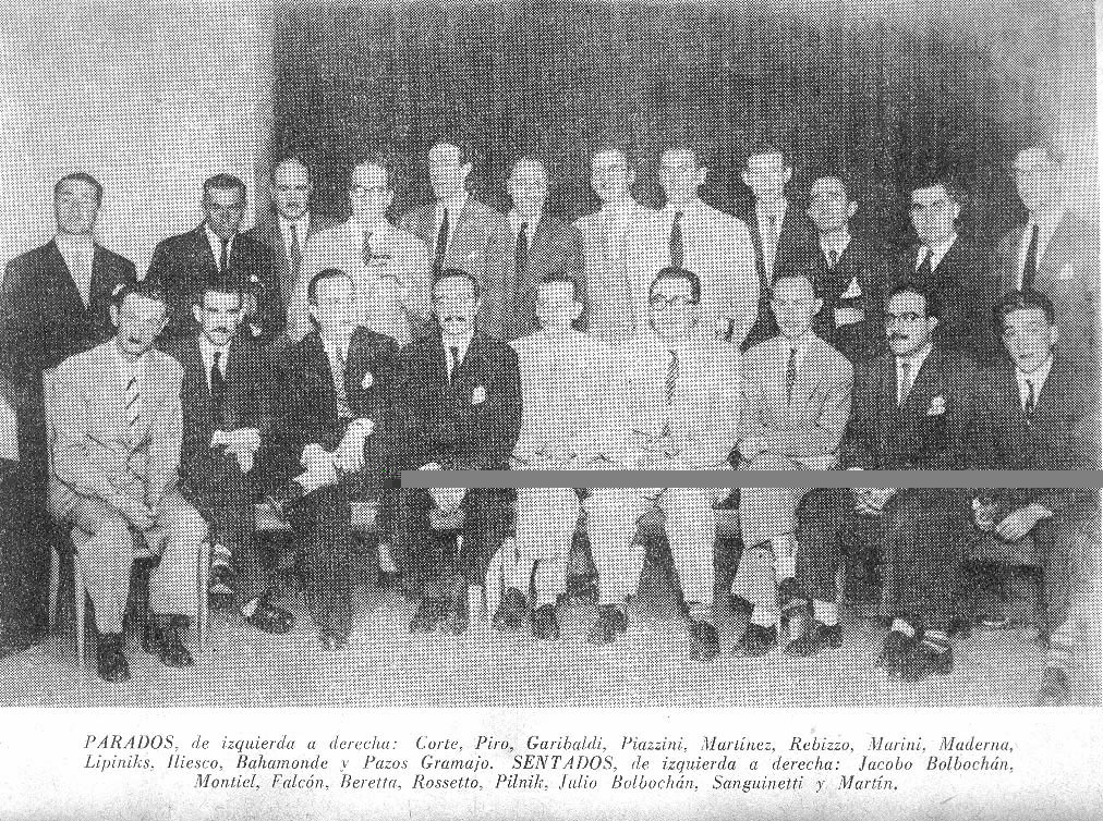 Participantes del Campeonato Argentino de Ajedrez de 1946